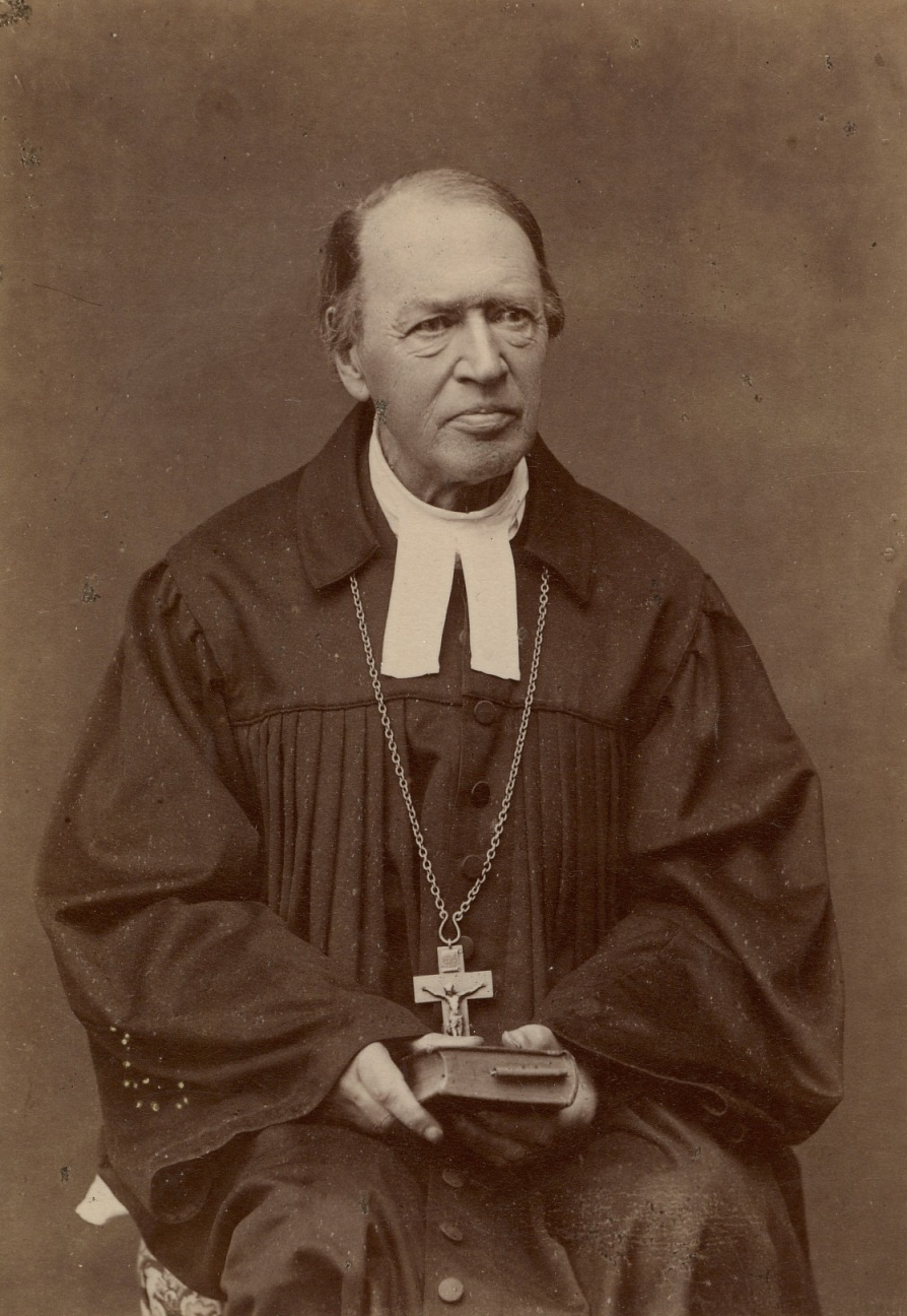 Koeru pastor Heinrich Ferdinand Hoffmann